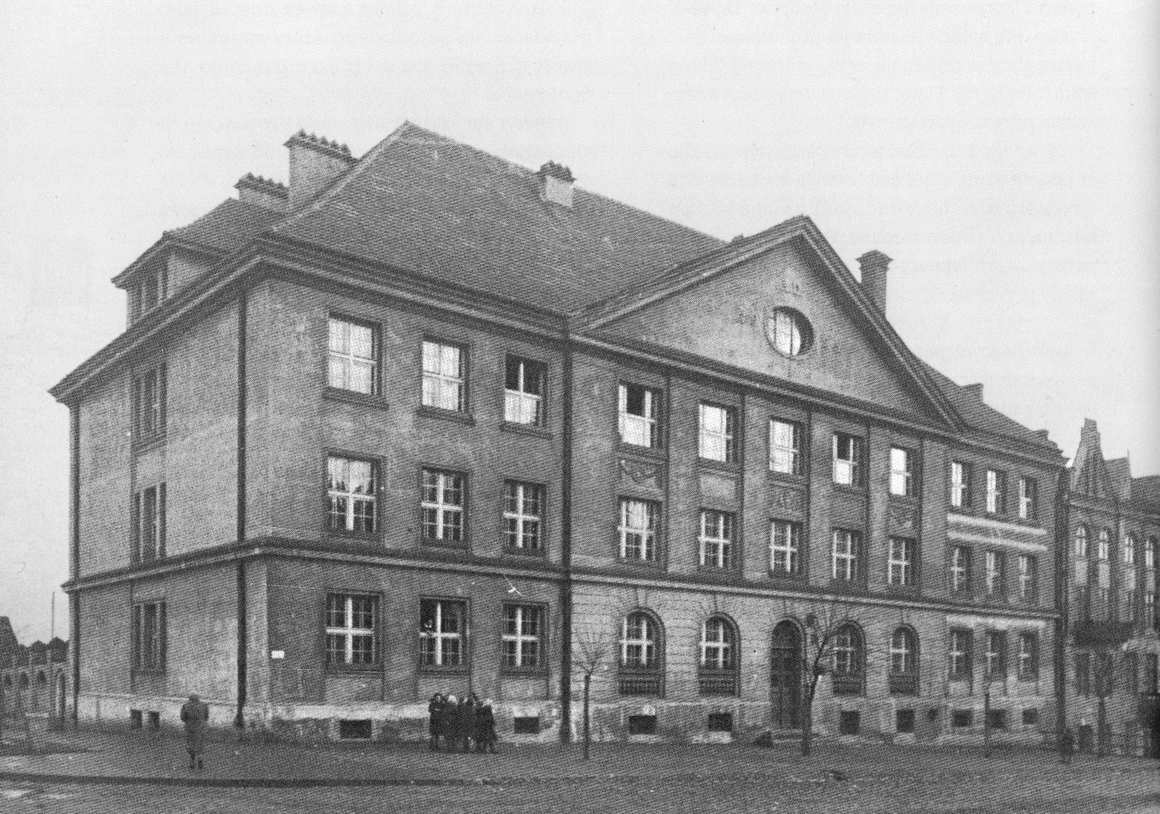 Publiczna Szkoła Powszechna nr 3 im. Emilii Plater przy ul. Rybaki 32